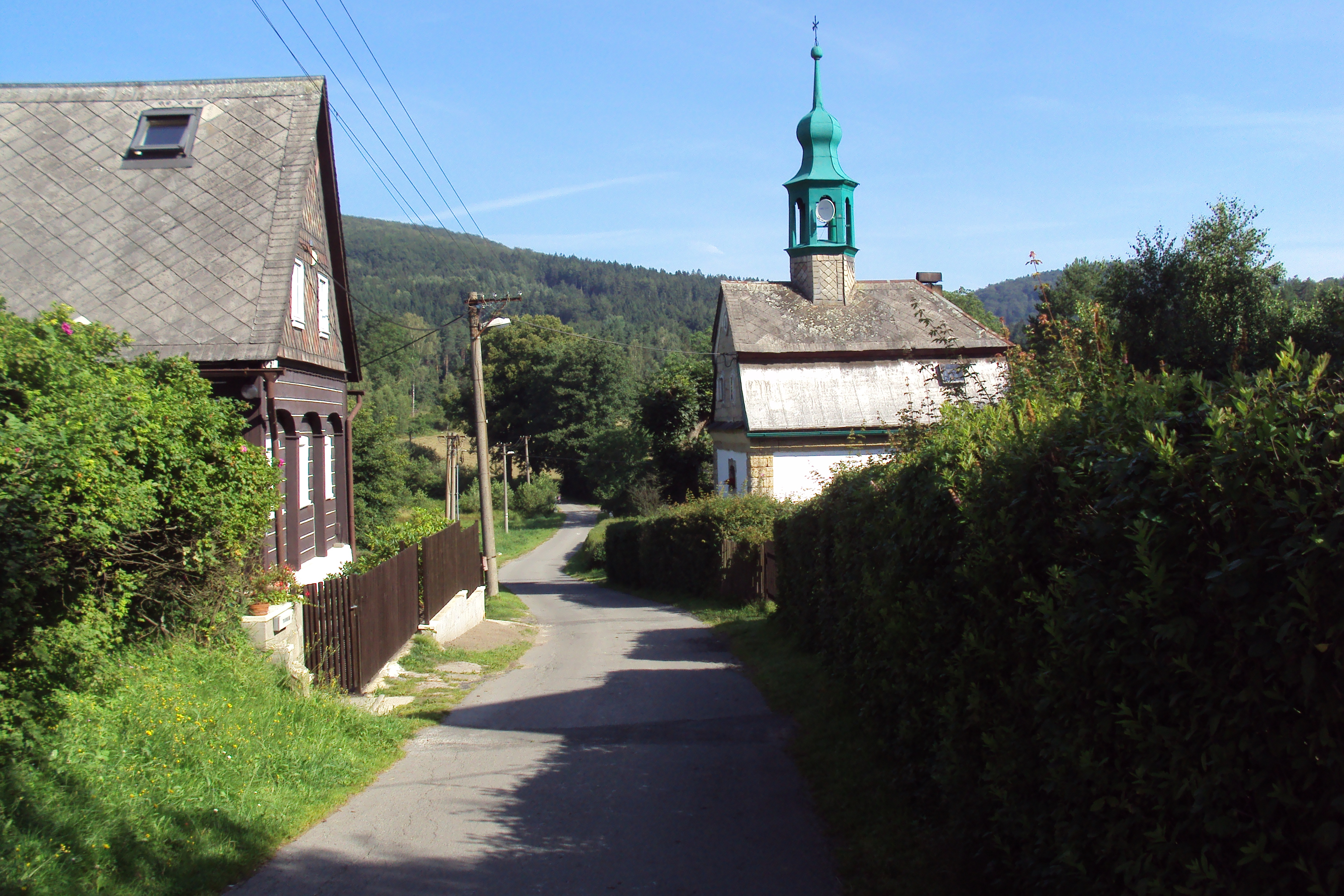 Bývalá kaple v osadě Naděje u Cvikova